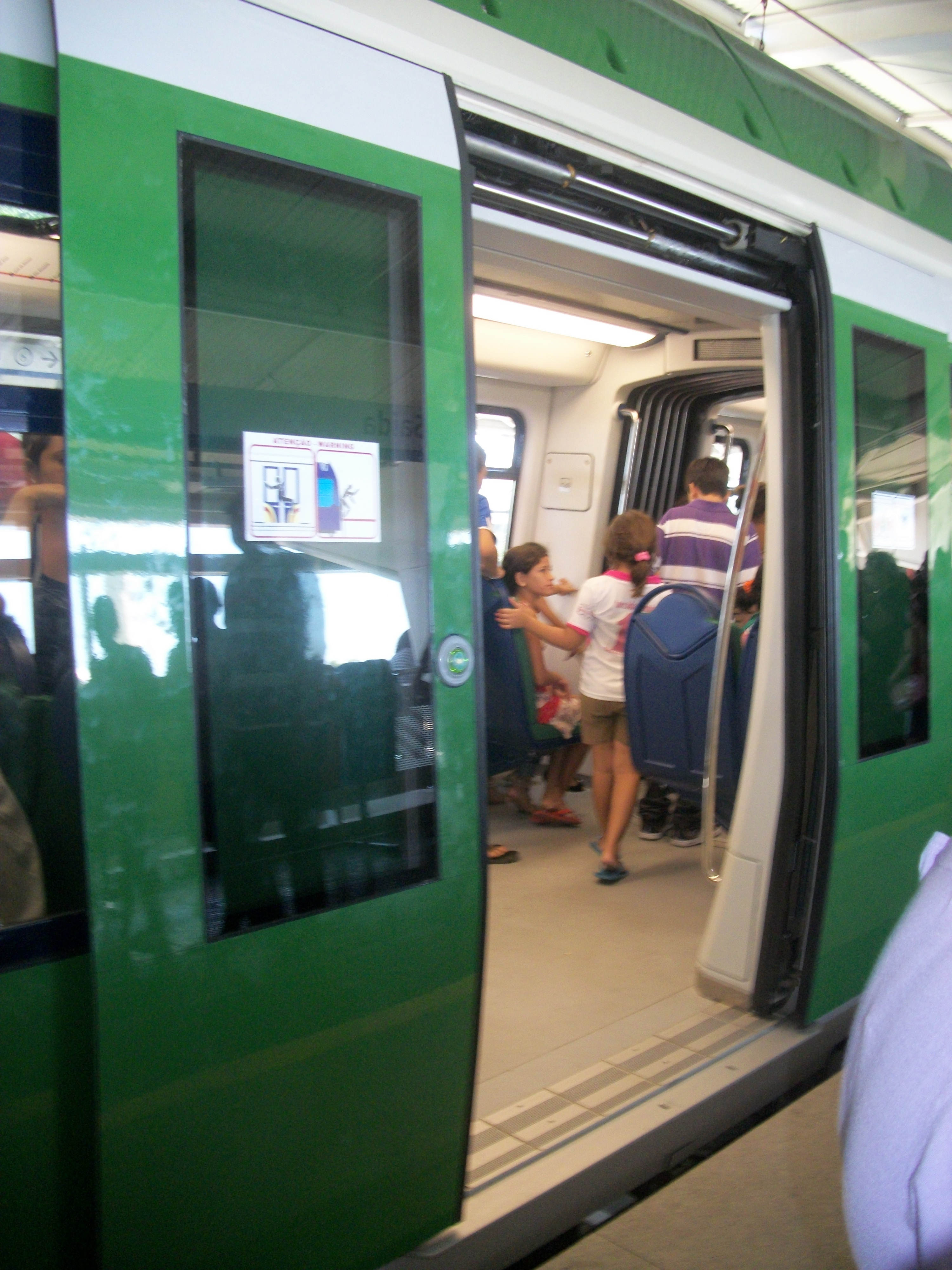 Vista do metrô de Fortaleza